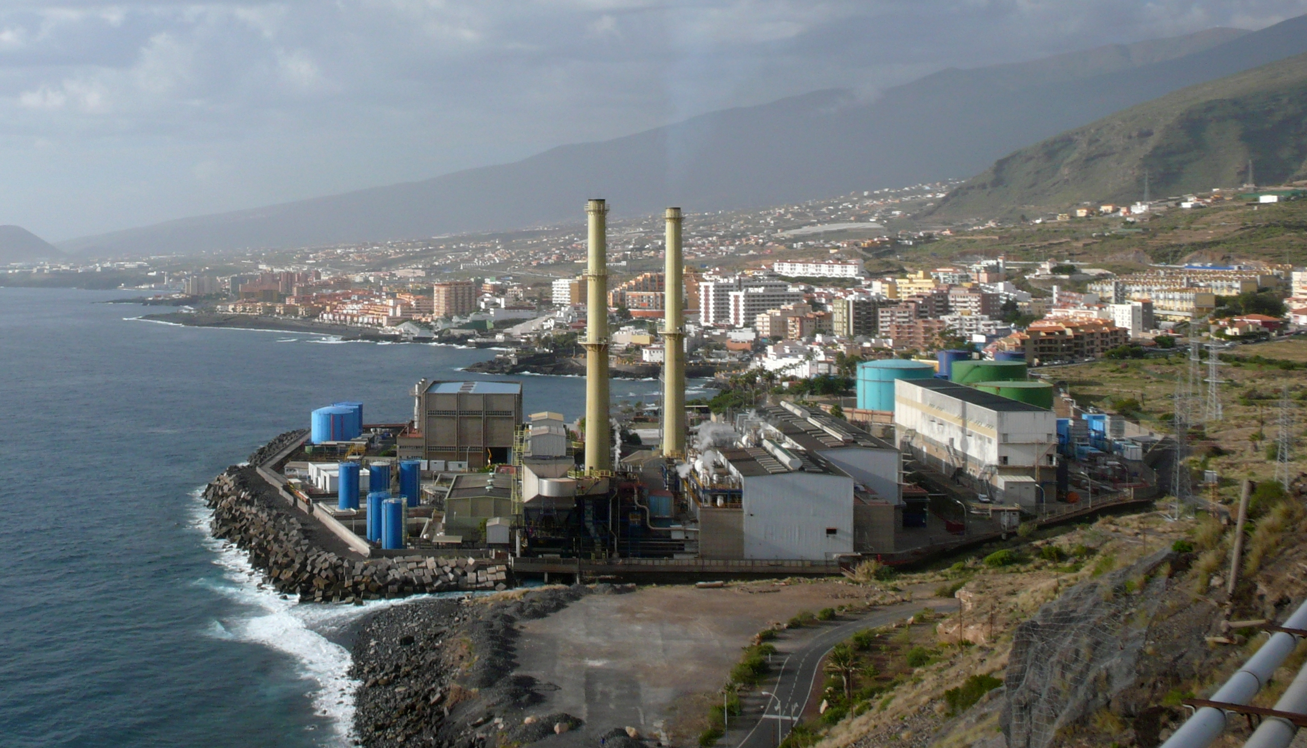 Central de Unelco-Caletillas y al fondo, el Valle de Güímar